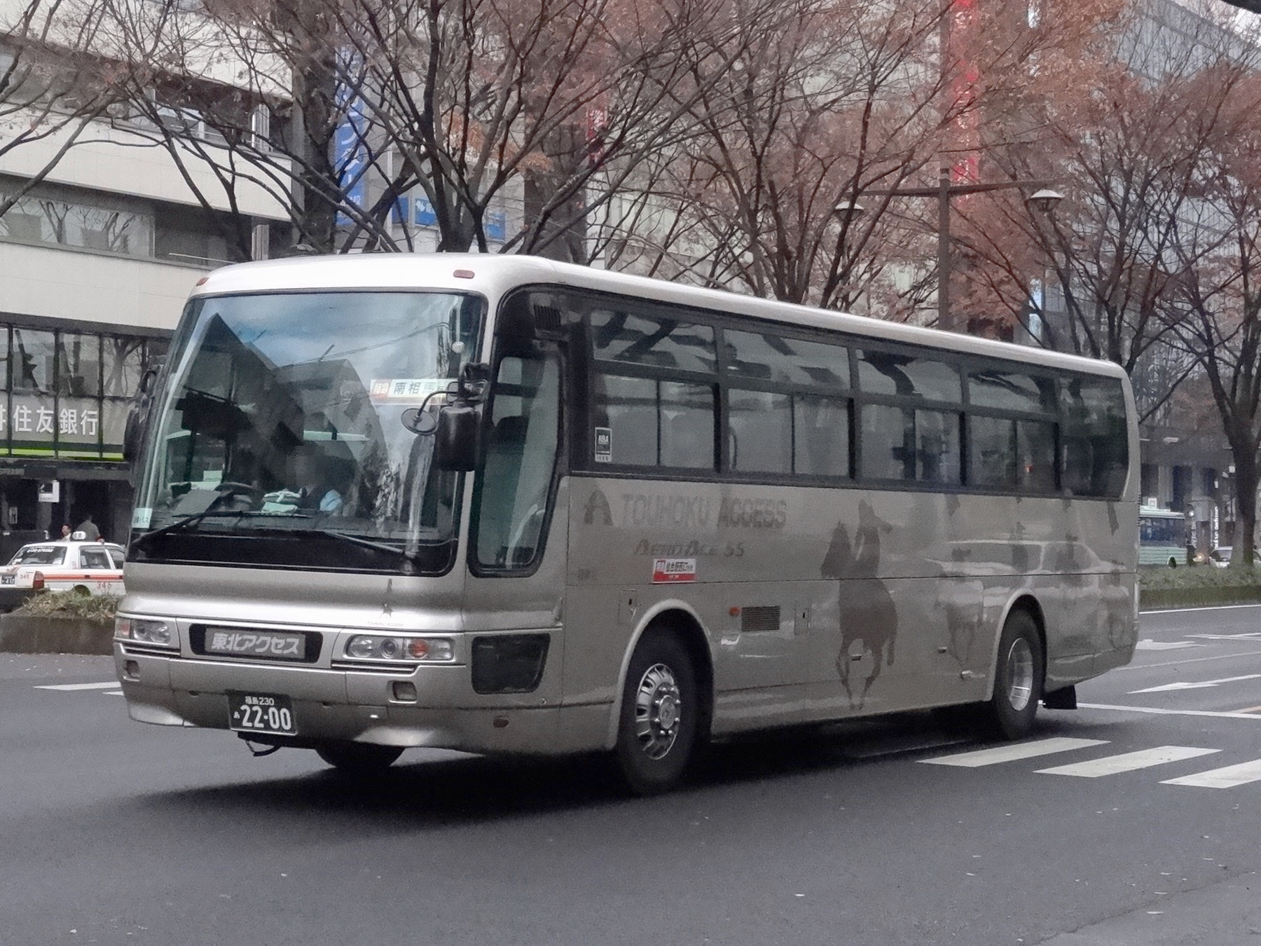 Sendai Station to Minami-Sōma